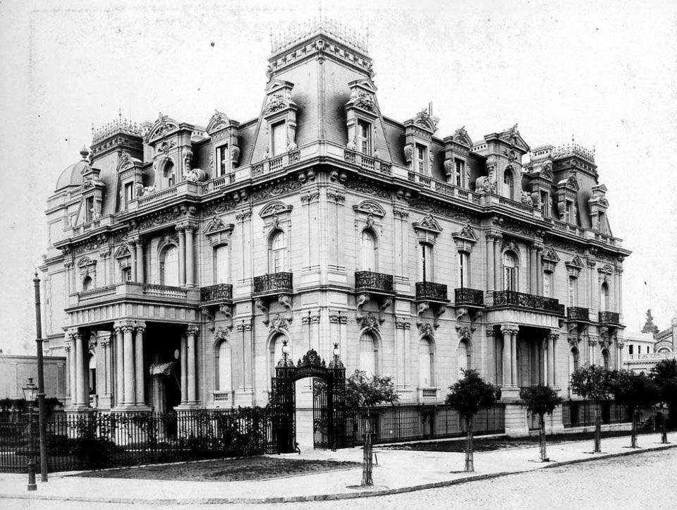 Fachadas del Palacio Ortiz Basualdo en Plaza San Martín, Buenos Aires. Encargado por Magdalena Dorrego de Ortiz Basualdo (1826-1905) para su hija mayor, Inés Ortiz Basualdo (1853-1922), y su hijo menor, Carlos Ortiz Basualdo. Demolido.